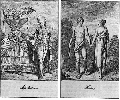 Kupferstich aus "Natürliche und affektierte Handlungen des Lebens"